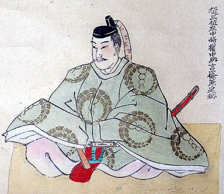 一条兼定の肖像。